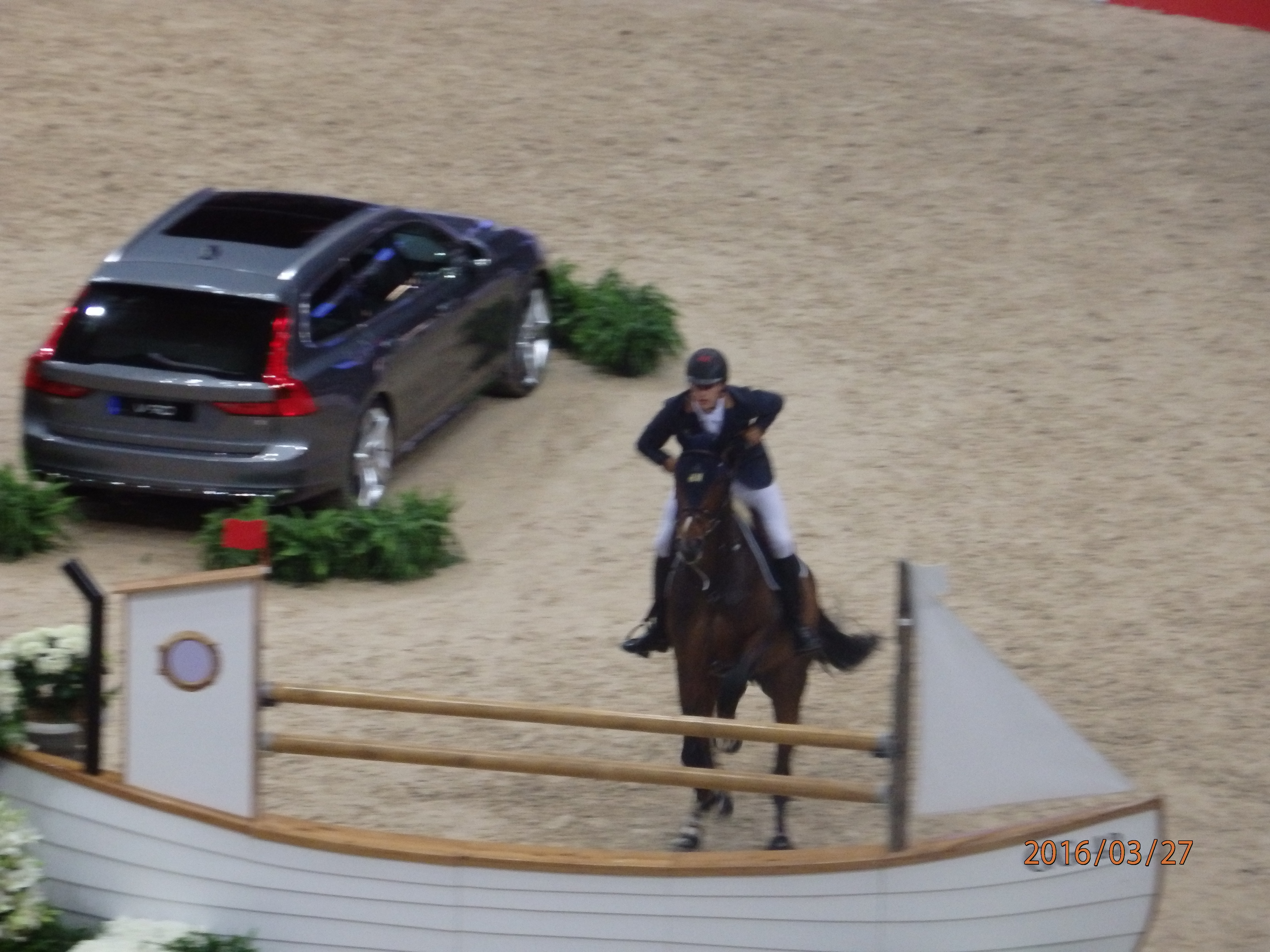 Nicola Philippaerts under Göteborg Horse show.